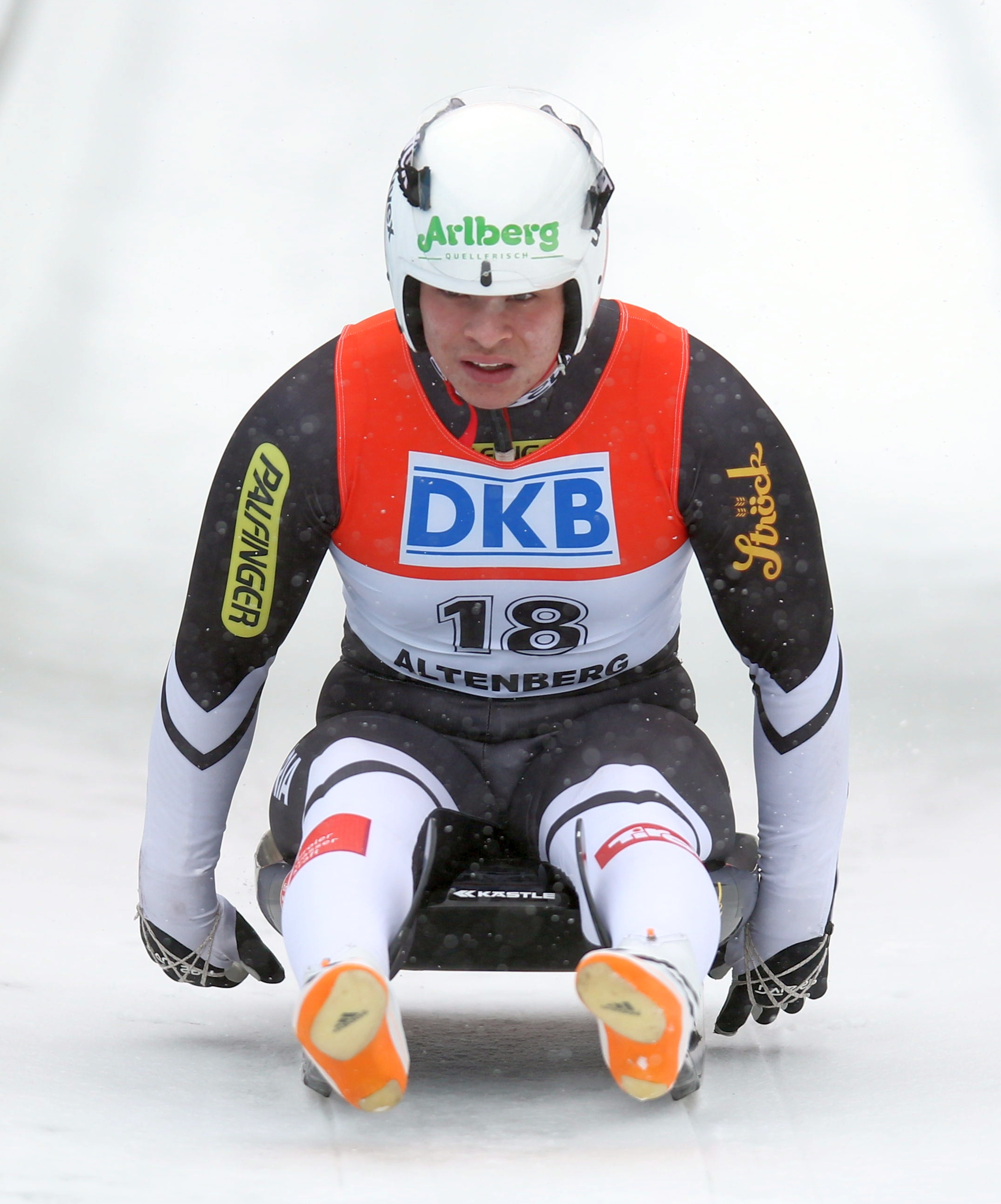 Jonas Müller beim Rennrodel-Nationencup der Herren in Altenberg 2017